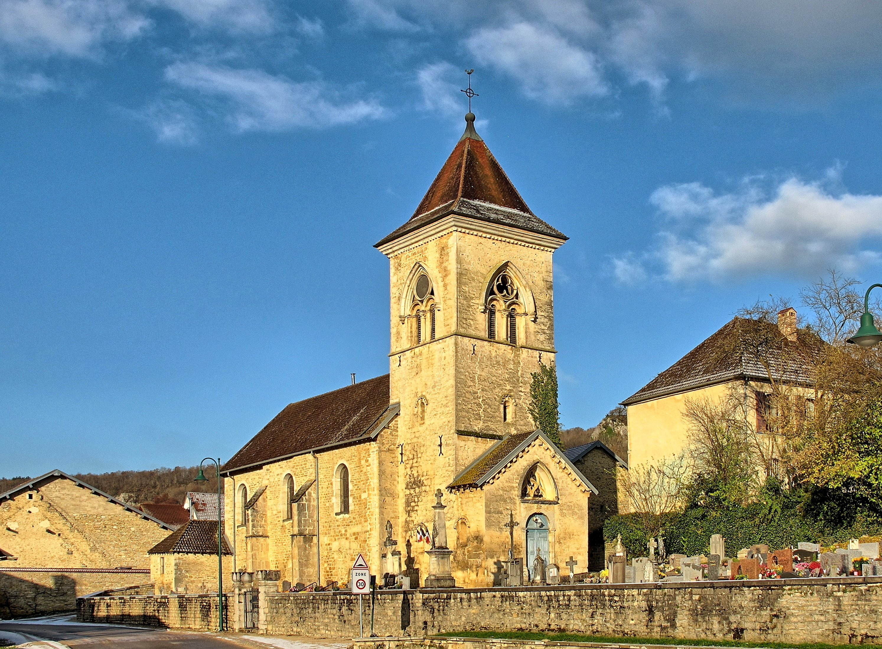 Inscrit aux monuments historiques sous le numéro PA00101778